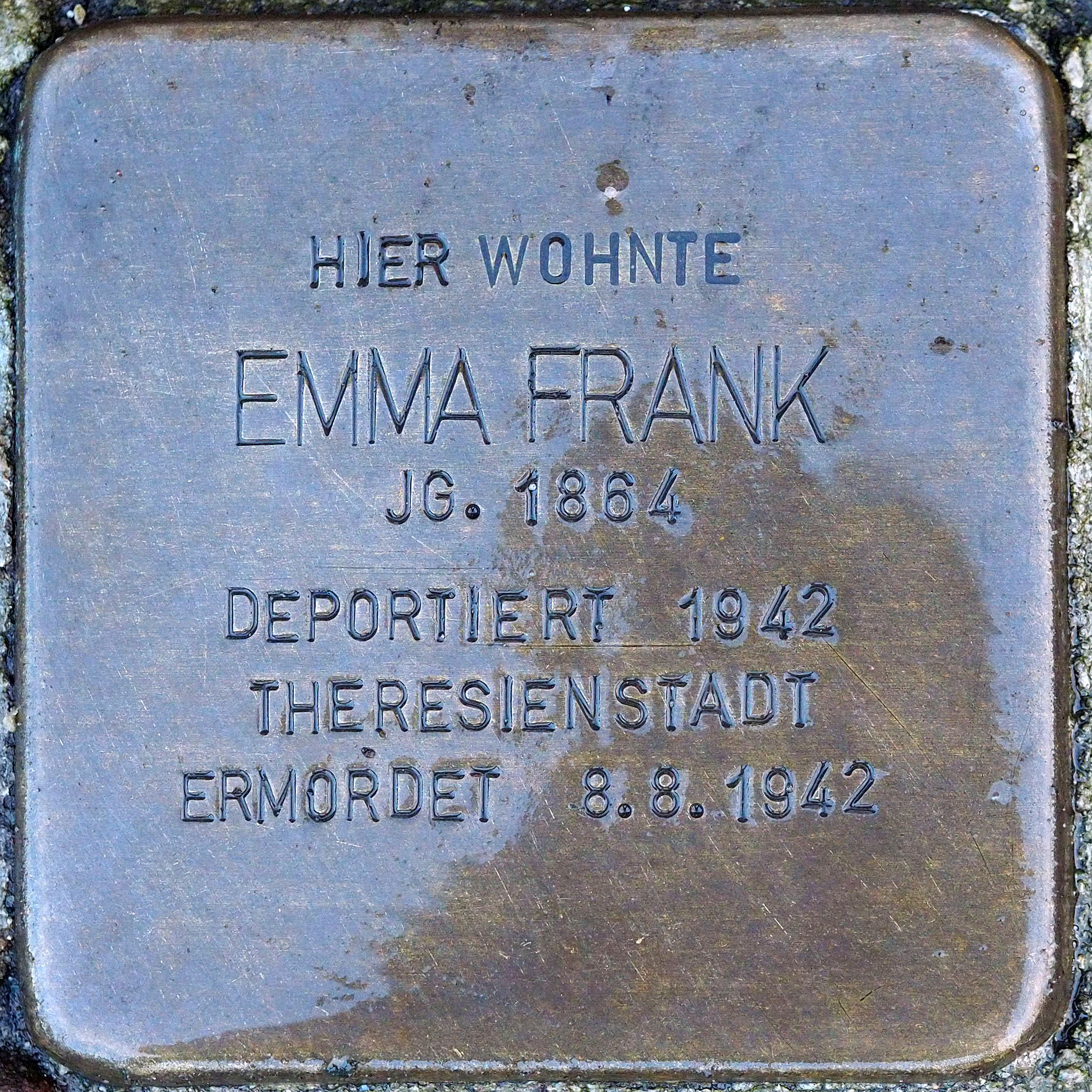 Stolpersteine Grefrath: Frank, Emma